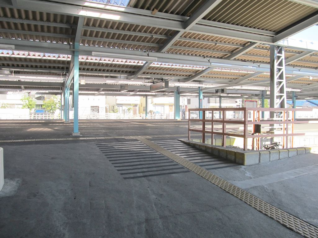 京王競馬場線府中競馬正門前駅の撮影が行われる広いホーム。右手前が一番線。